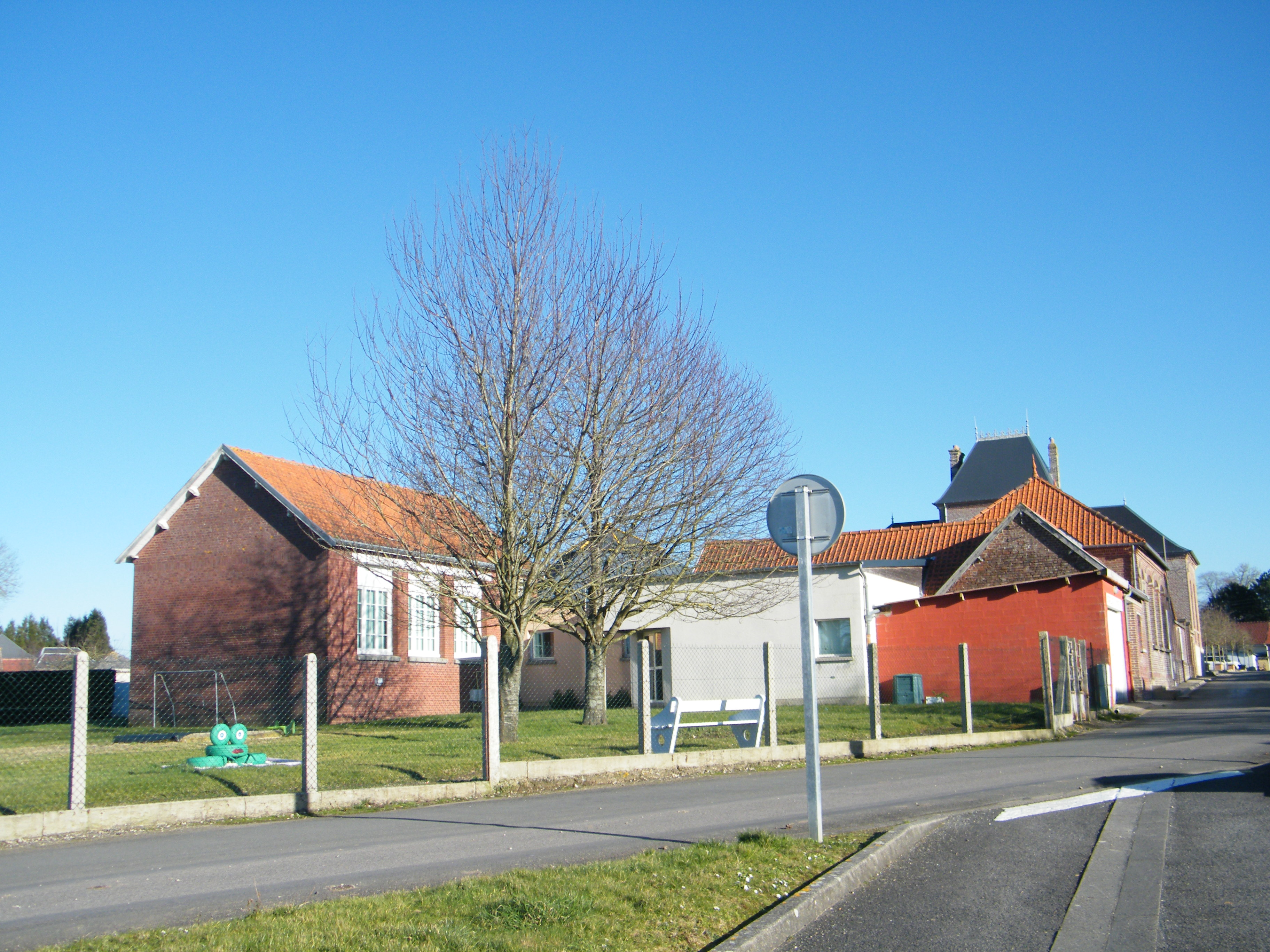 Embreville, Somme, Fr, école